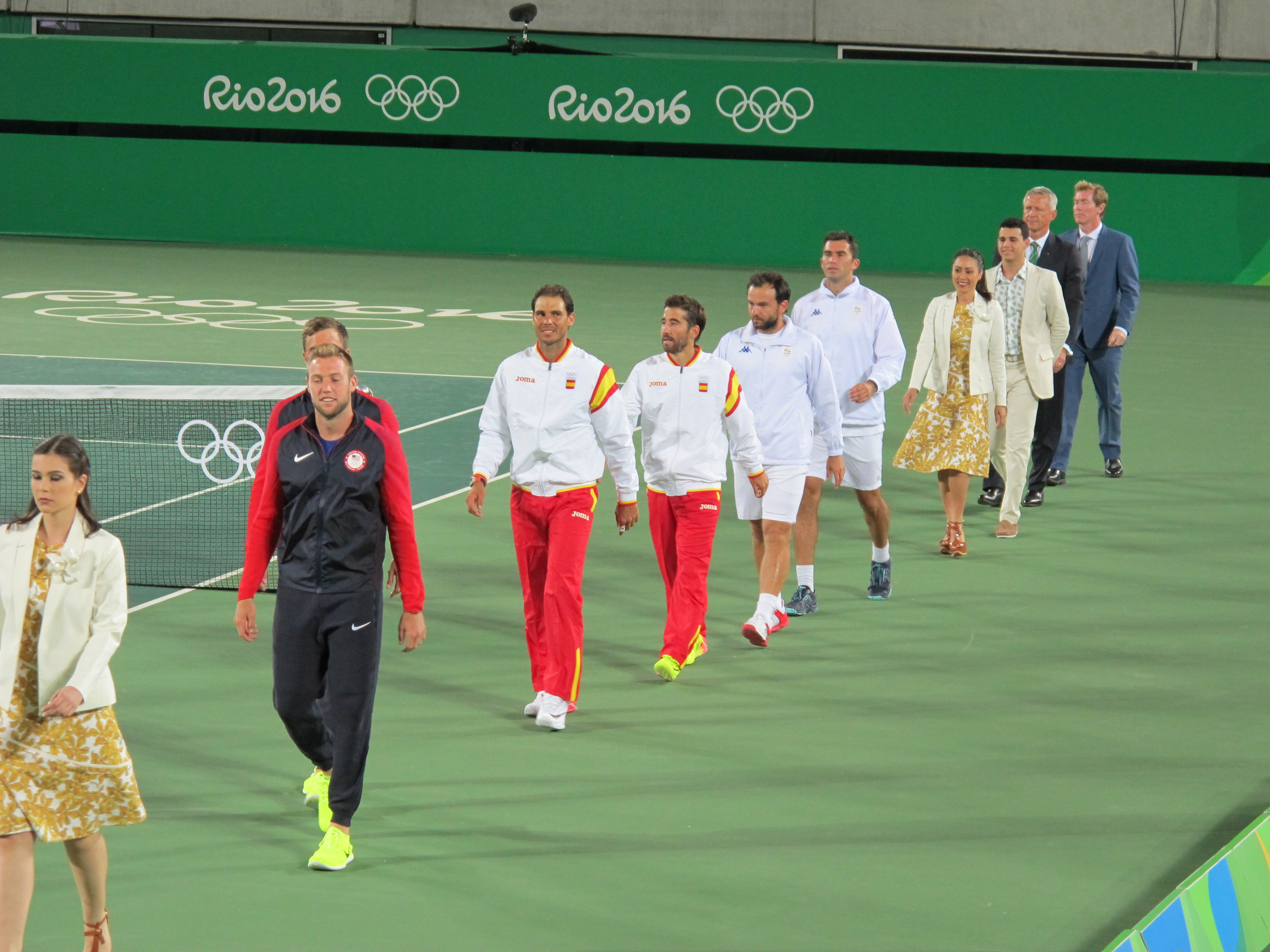 Nadal e Lopez caminham para receber as medalhas de ouro, Centro Olímpico de Tênis. Rio 2016